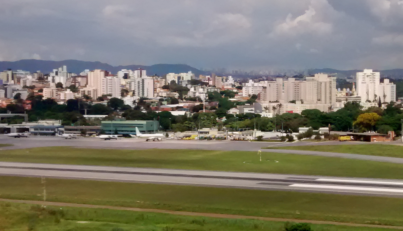 Patio Sul do Aeroporto da Pampulha.